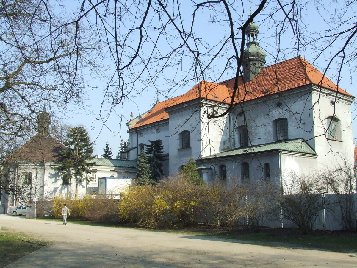 POL_Warsaw_Kościół św. Antoniego w Warszawie, ul. Senatorska, widok z Ogrodu Saskiego